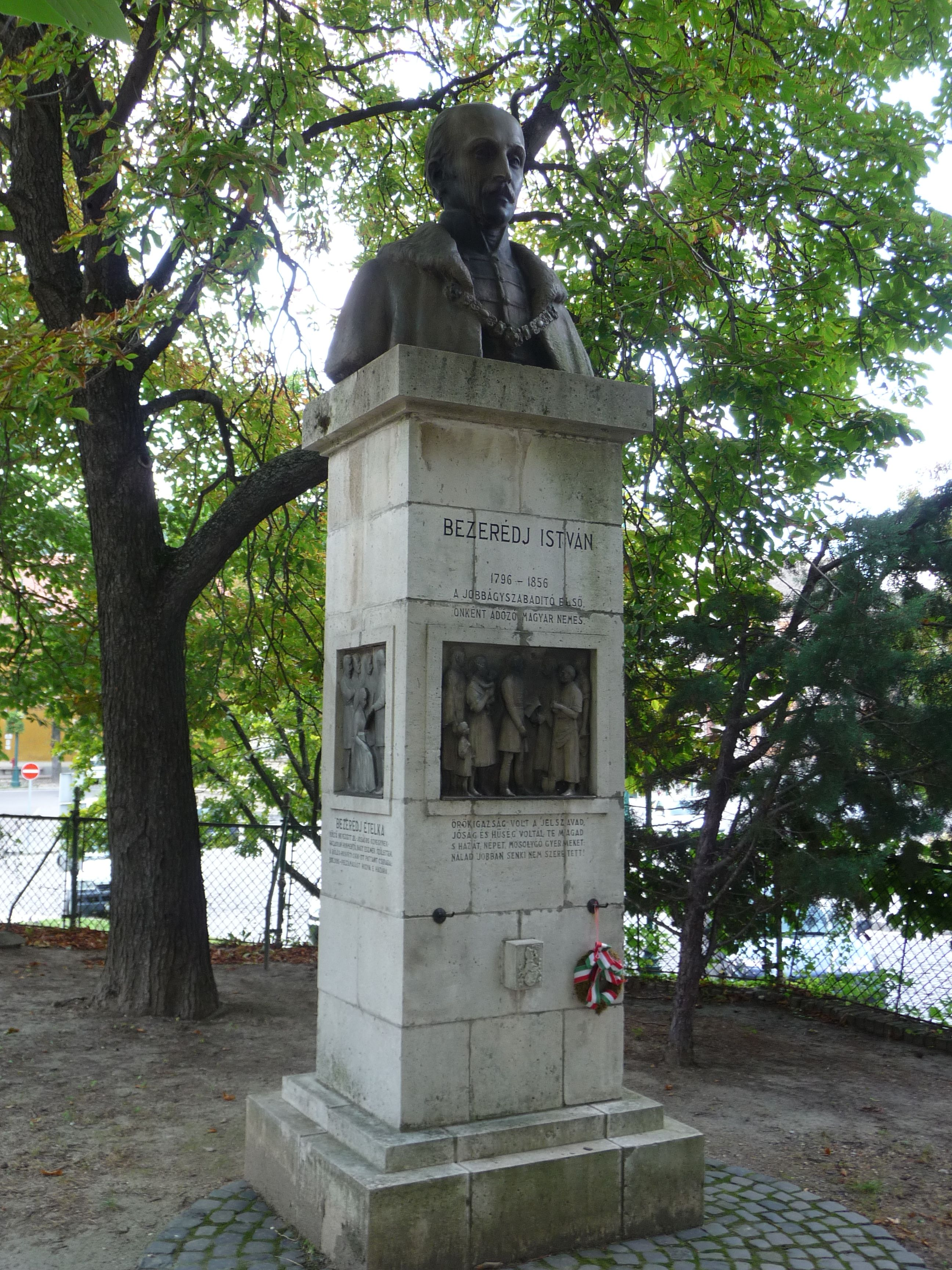 Bezerédj István emlékműve a Megyeháza kertjében, Szekszárd